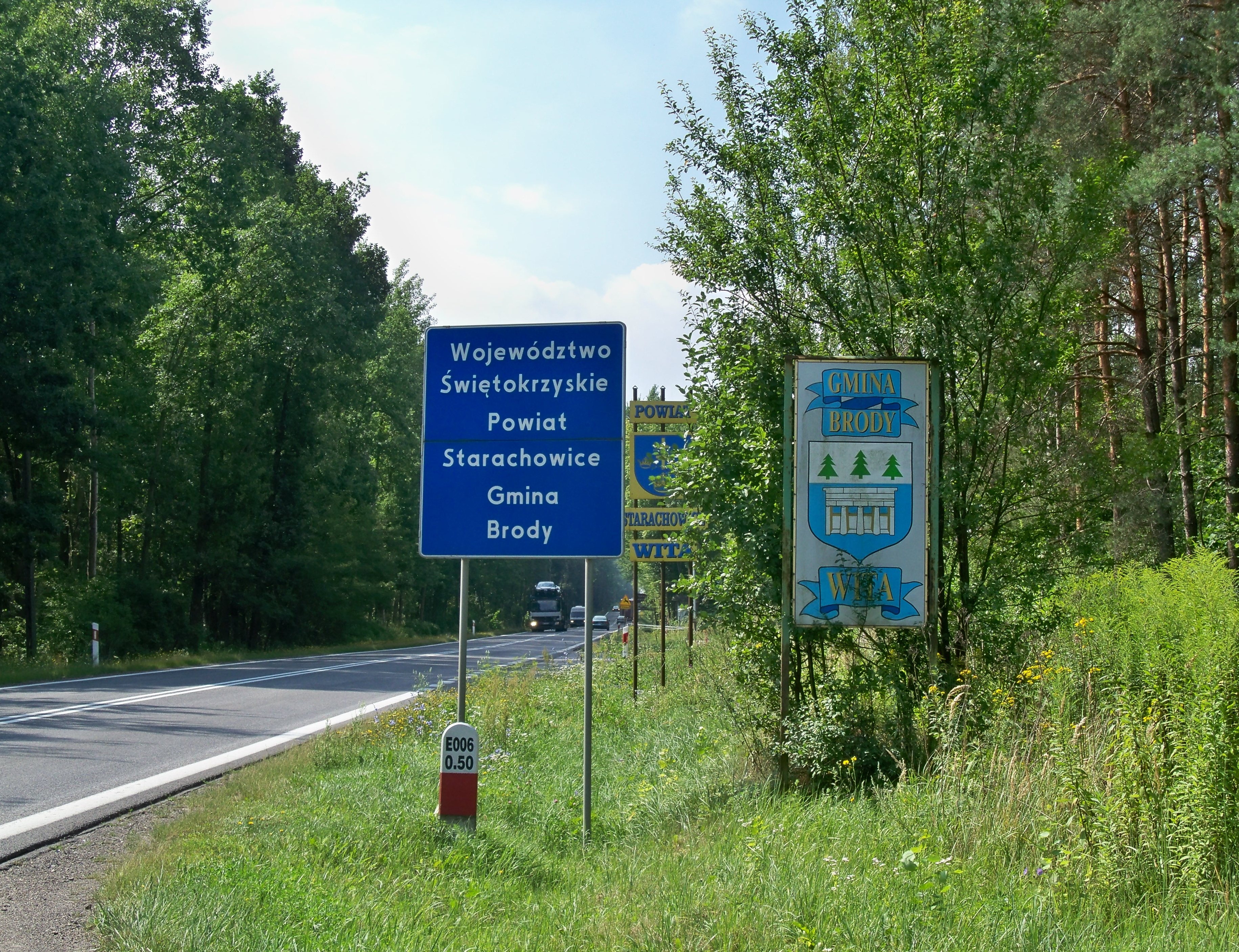 Granica między Marculami (gmina Iłża, powiat radomski, woj. mazowieckie) a Lubienią (gm. Brody, pow. starachowicki, woj. świętokrzyskie). Trasa krajowa nr 9. Puszcza Iłżecka.